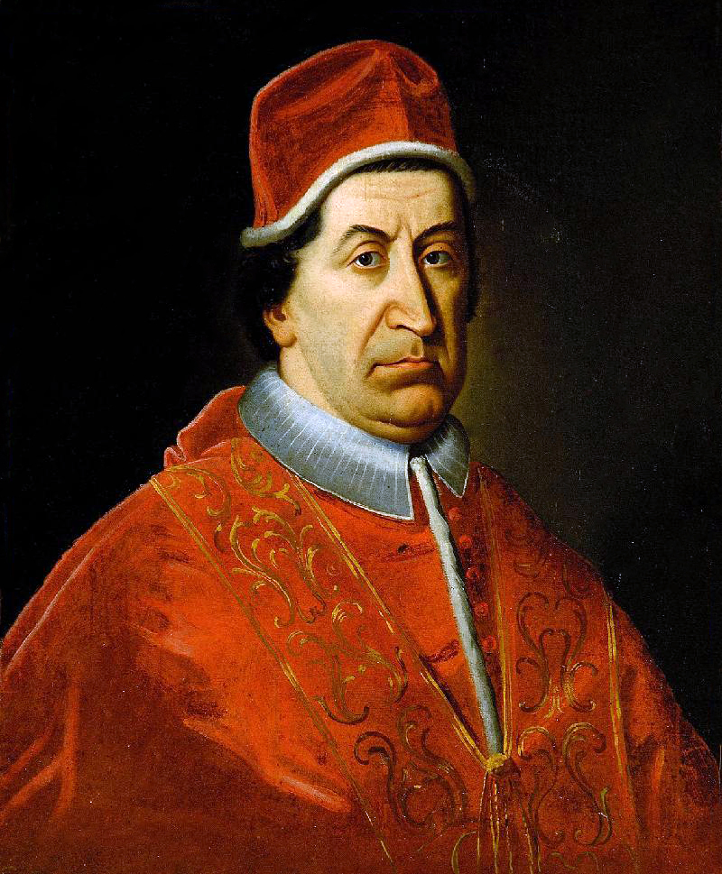 Bottega italiana (1700-1721), Ritratto di Clemente XI